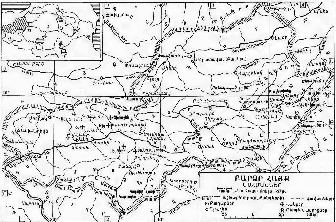 Բարձր Հայք